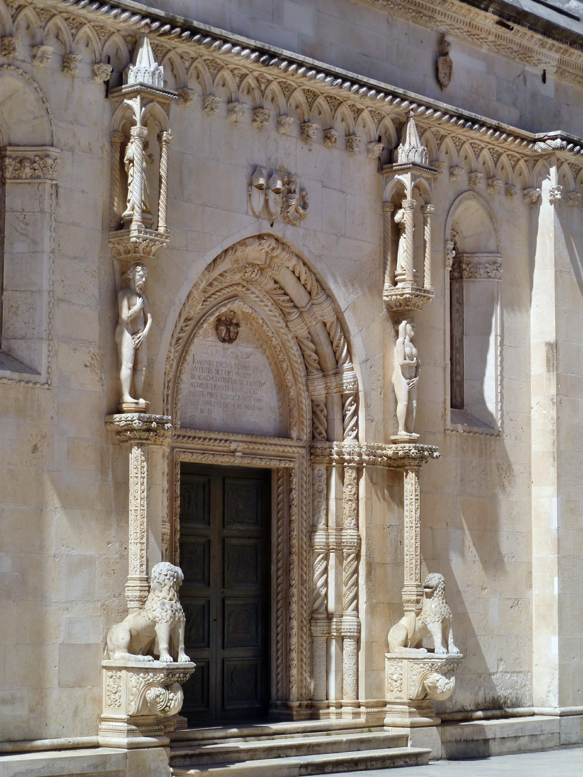 The Lion Gate of the Cathedral of St. Jacob in Šibenik, Croatia, by Bonino da Milano; the statues are the work of Juraj Dalmatinac